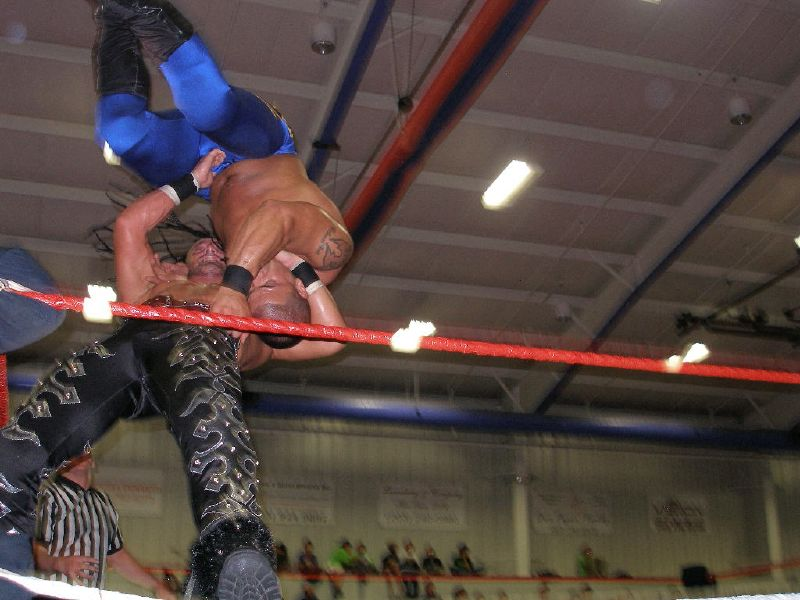 Birch aplicando un suplex desde la tercera cuerda.